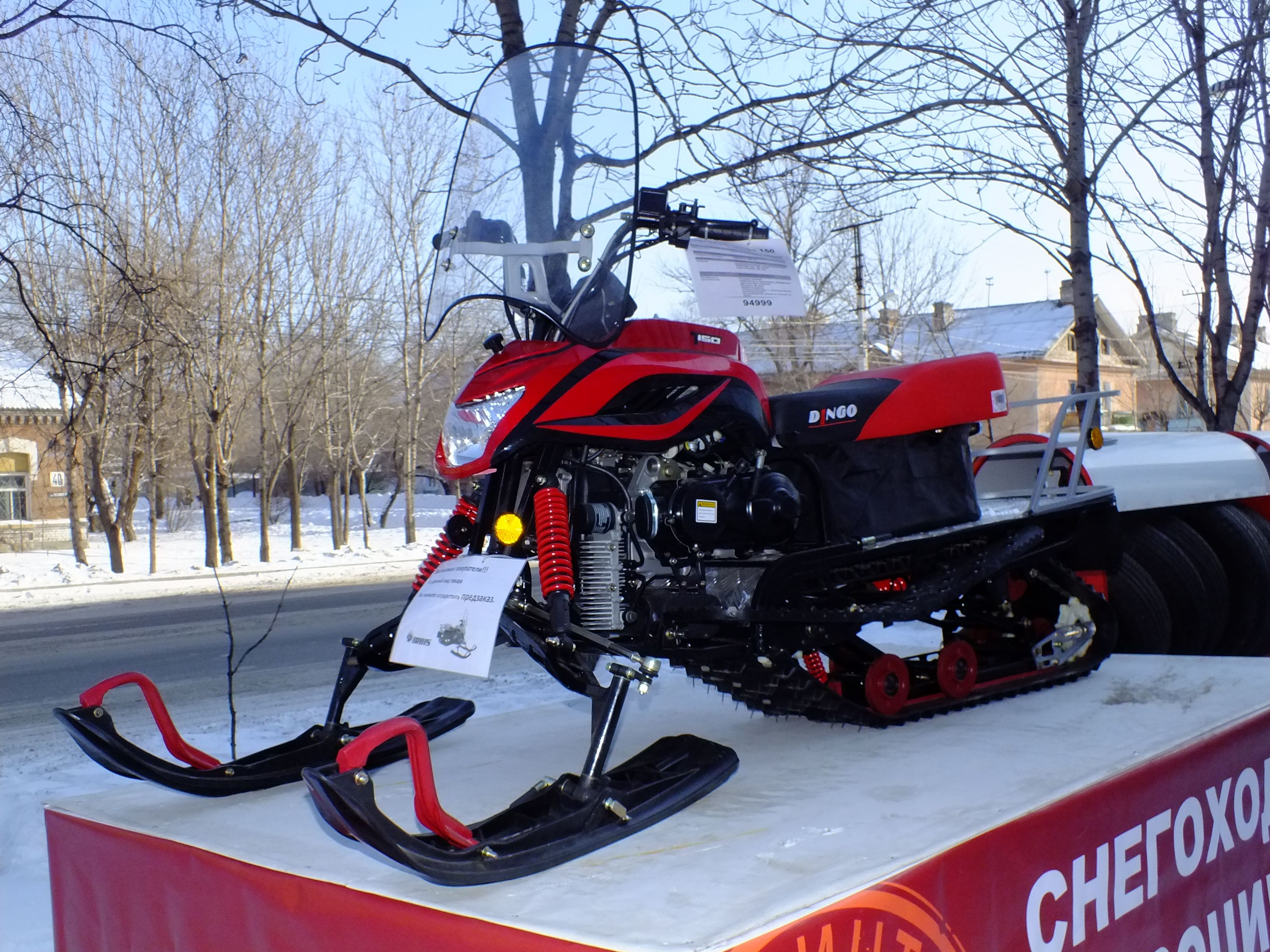 Снегоход DINGO